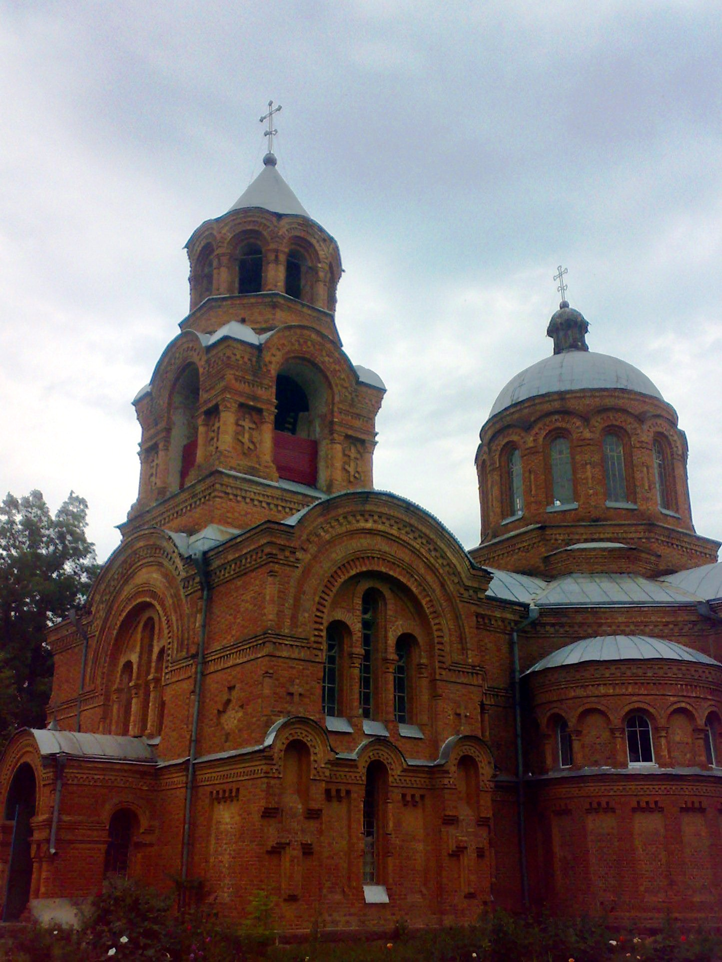 Загальний вигляд Успенської церкви (Коробчине, Новомиргородський район, Кіровоградська область)